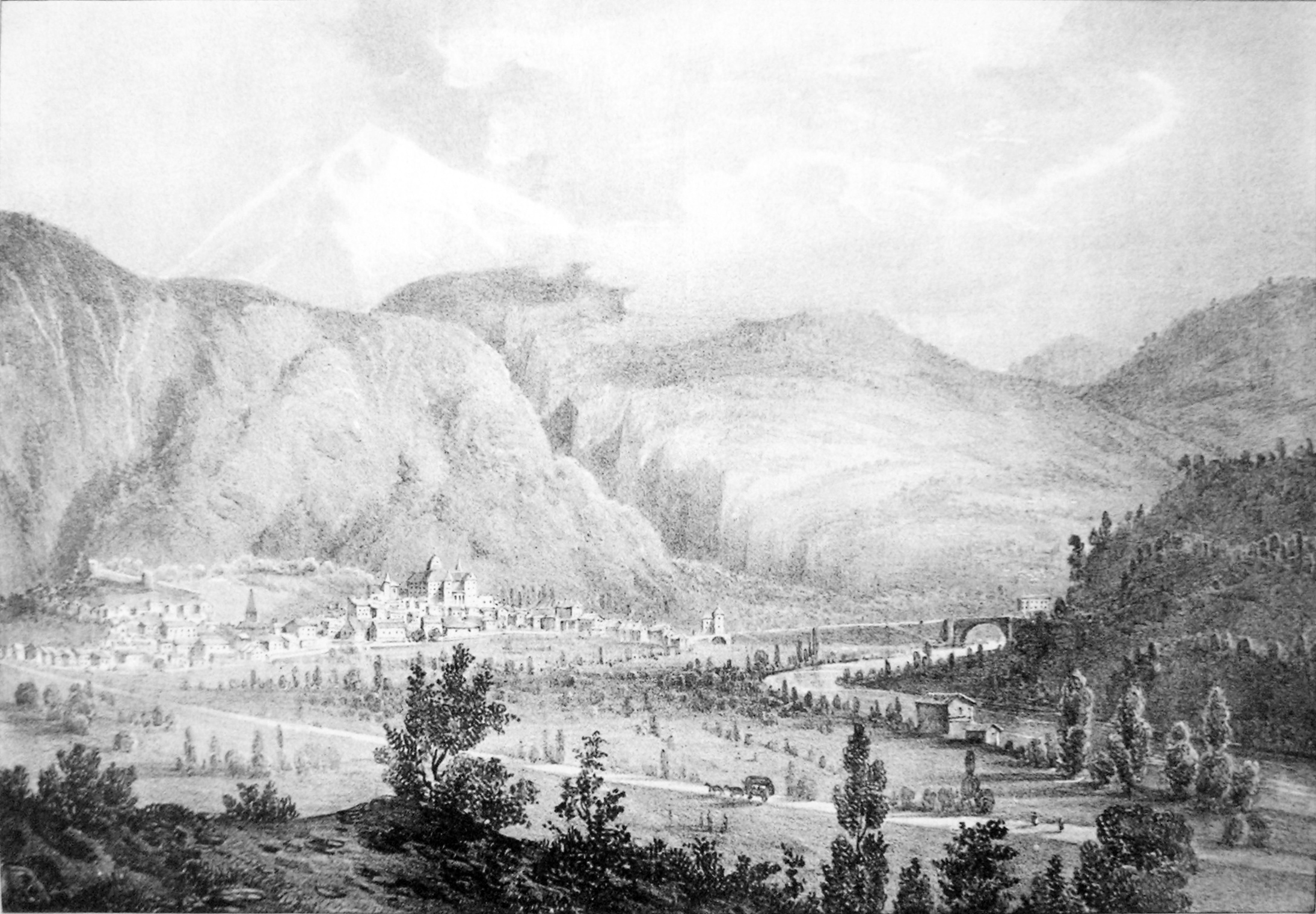 Vizille (Isère), vue prise de Cornage ATTENTION ! Ce facsimilé est réalisé en applicant des alterations avec un logiciel graphique à une copie numérique, obtenue à partir d'une prise de photo faite par un non-professionnel. Elle pourrait ne pas être parfaitement réussie.